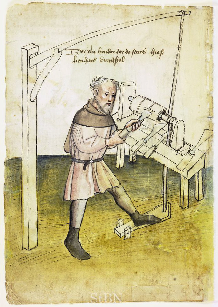 Dreher an einer Wippdrehbank lienhard (Lienhard; Leonhard.) Drechßel (Drechsler) , drechßel (Drechsler) Transkription und weitere Informationen